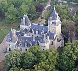 Vue du château de Ternay